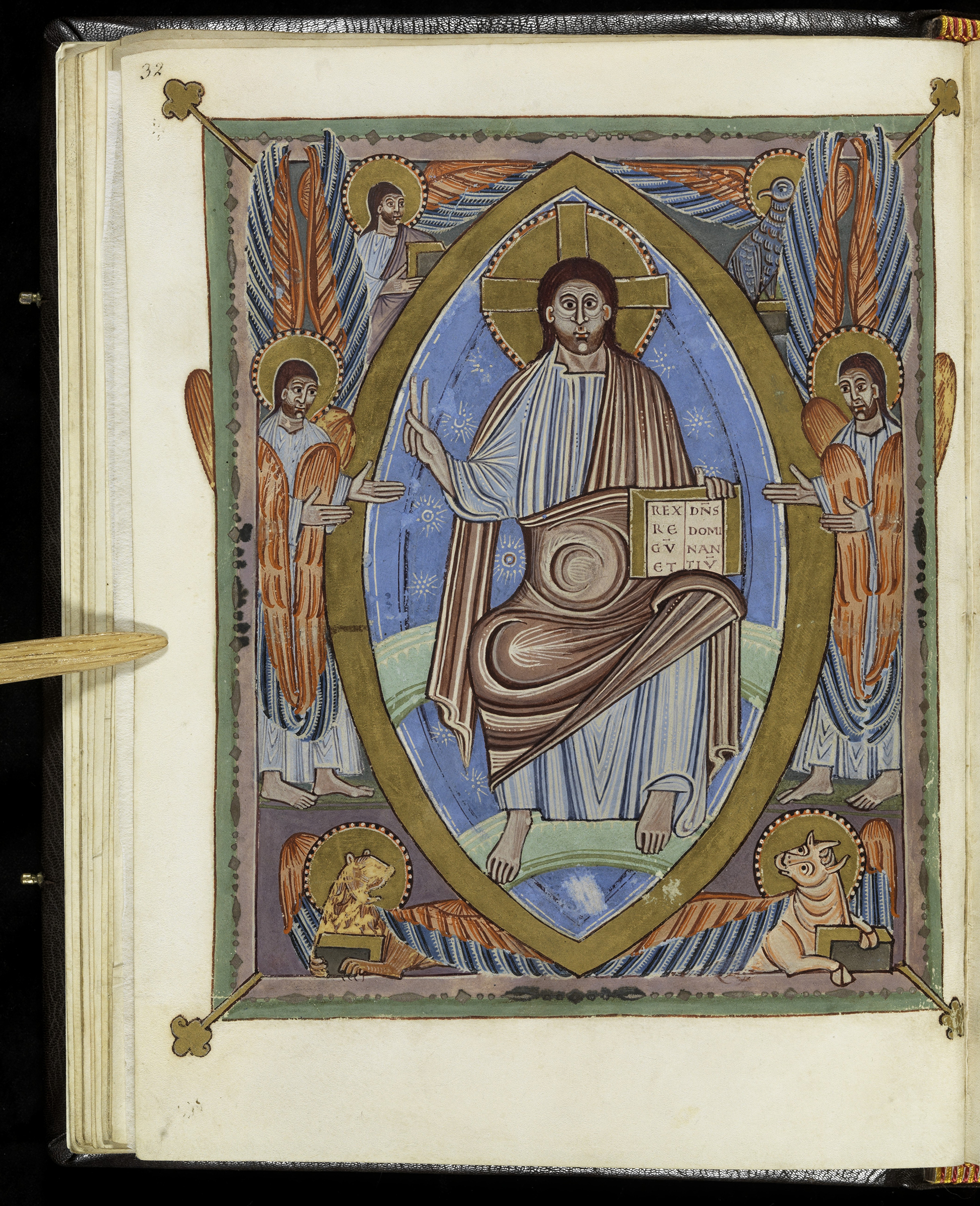 Przedstawienie zasiadającego na łuku tęczy Chrystusa, którego wpisaną w mandorlę postać flankują dwa sześcioskrzydłe serafiny. W rogach ukazano cztery Istoty Żyjące: człowieka, orła, lwa i wołu – zgodnie z tradycją symbolizujące ewangelistów: Mateusza, Jana, Marka i Łukasza. Chrystus, którego głowę otacza nimb krzyżowy, jedną rękę wznosi w geście alokucji, w drugiej trzyma zaś otwartą księgę z wypisanymi słowami „REX REGU[M] ET D[OMI]N[U]S DOMINANTIU[M]” – wyjętym z Apokalipsy (19,16)tytułem „Król nad królami i Pan nad pany”. Autor: Łukasz Kozak